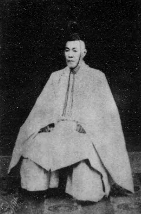 中山忠能の肖像。